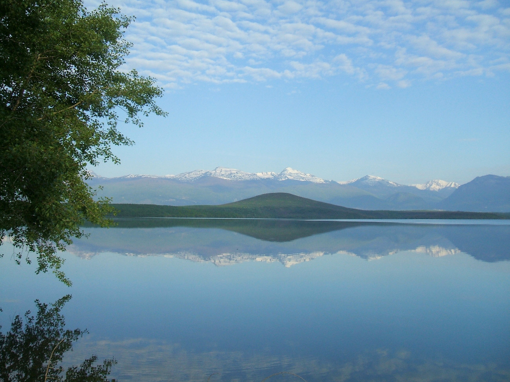 Radoniqi lake mirror of albanian alps